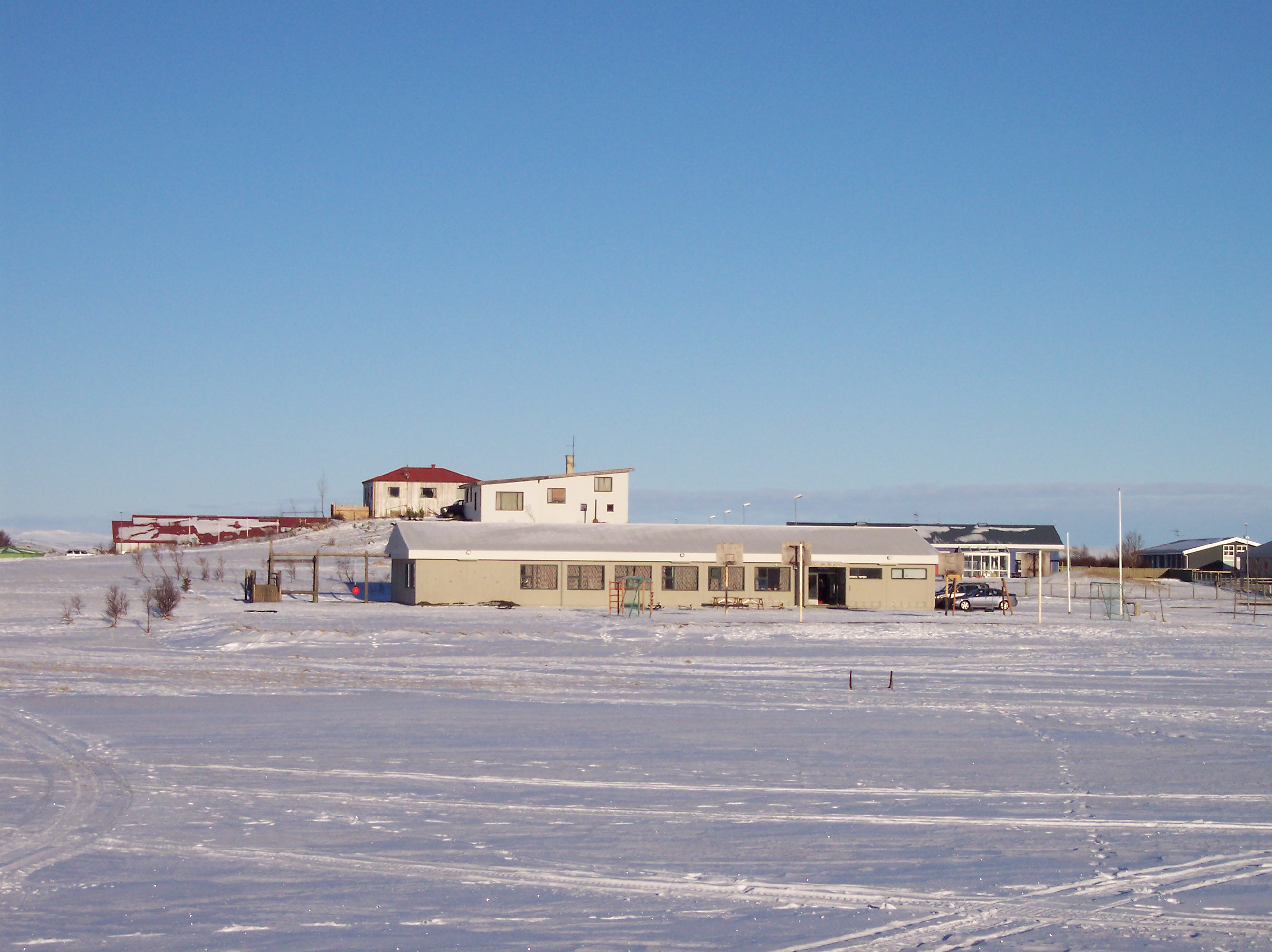 Andakílsskóli, Hvanneyri